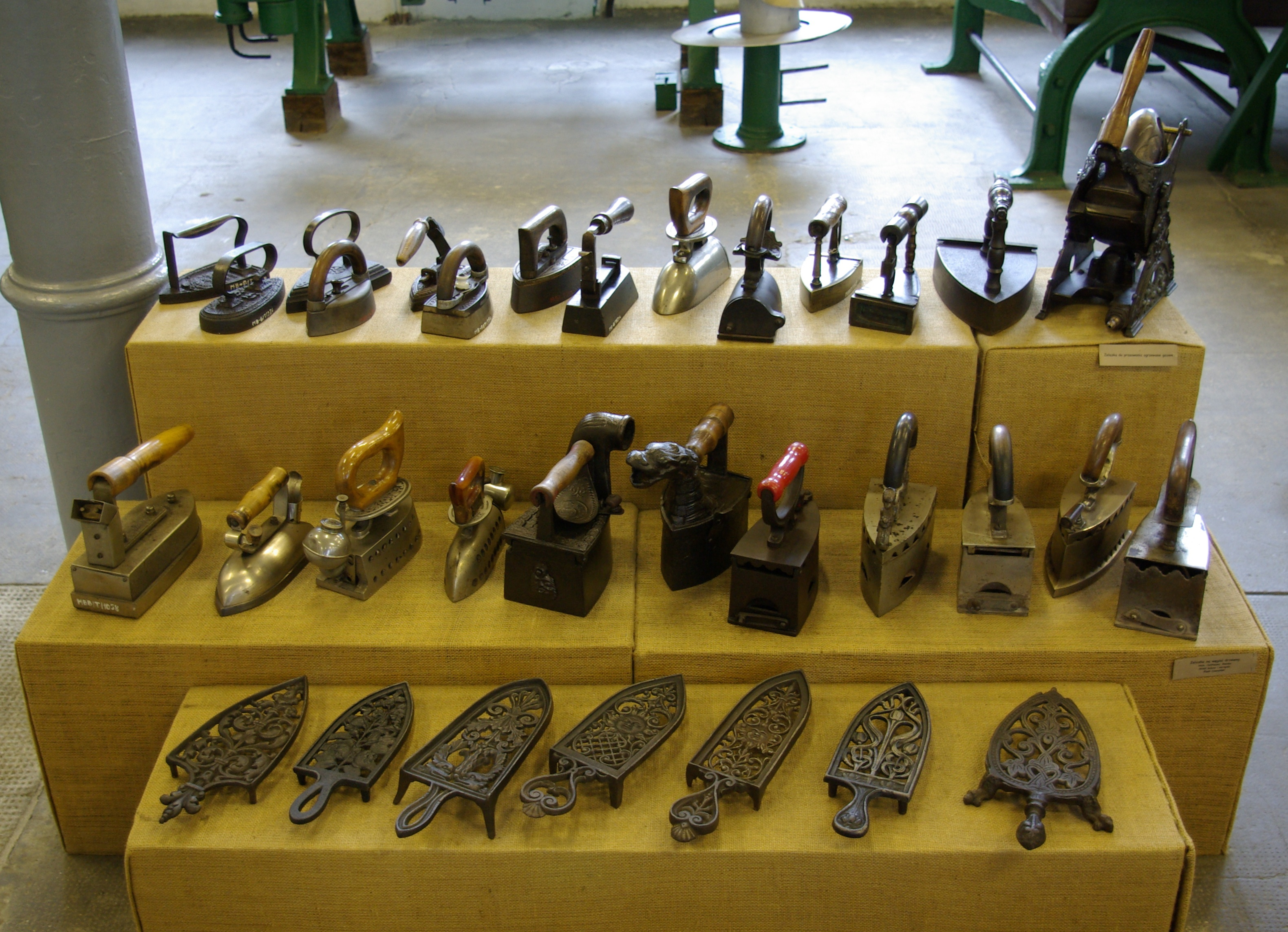 Muzeum Techniki i Włókiennictwa - oddział Muzeum w Bielsku-Białej